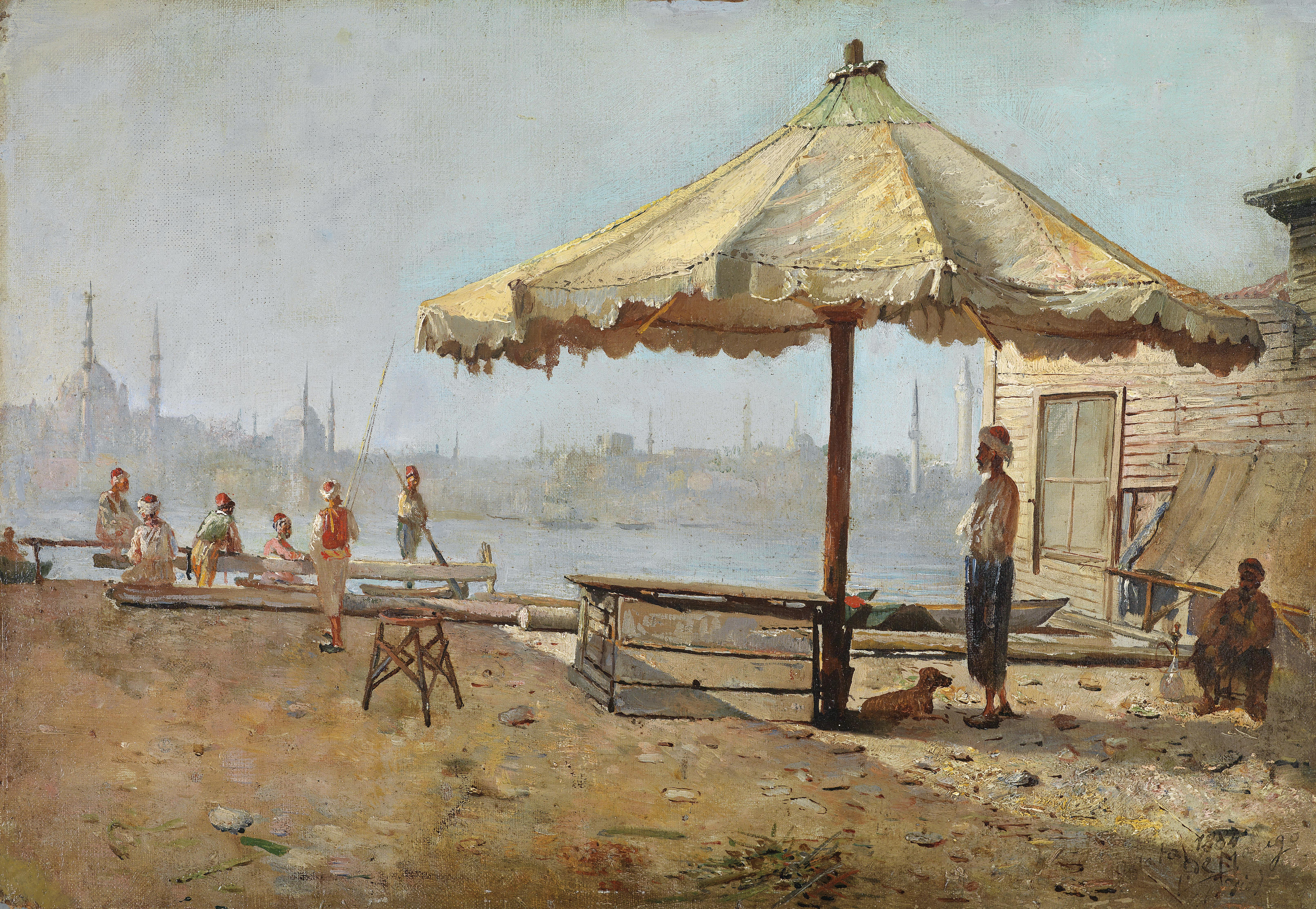 Am Goldenen Horn, Konstantinopel, signiert, datiert und bezeichnet L. De Mango, 1884, Galata, Öl auf Leinwand auf Karton, 31 x 45,5 cm